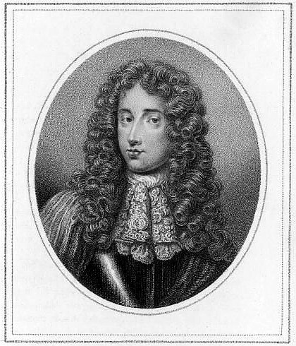 Peregrine Osborne (1658-29) 2nd Duke of Leeds